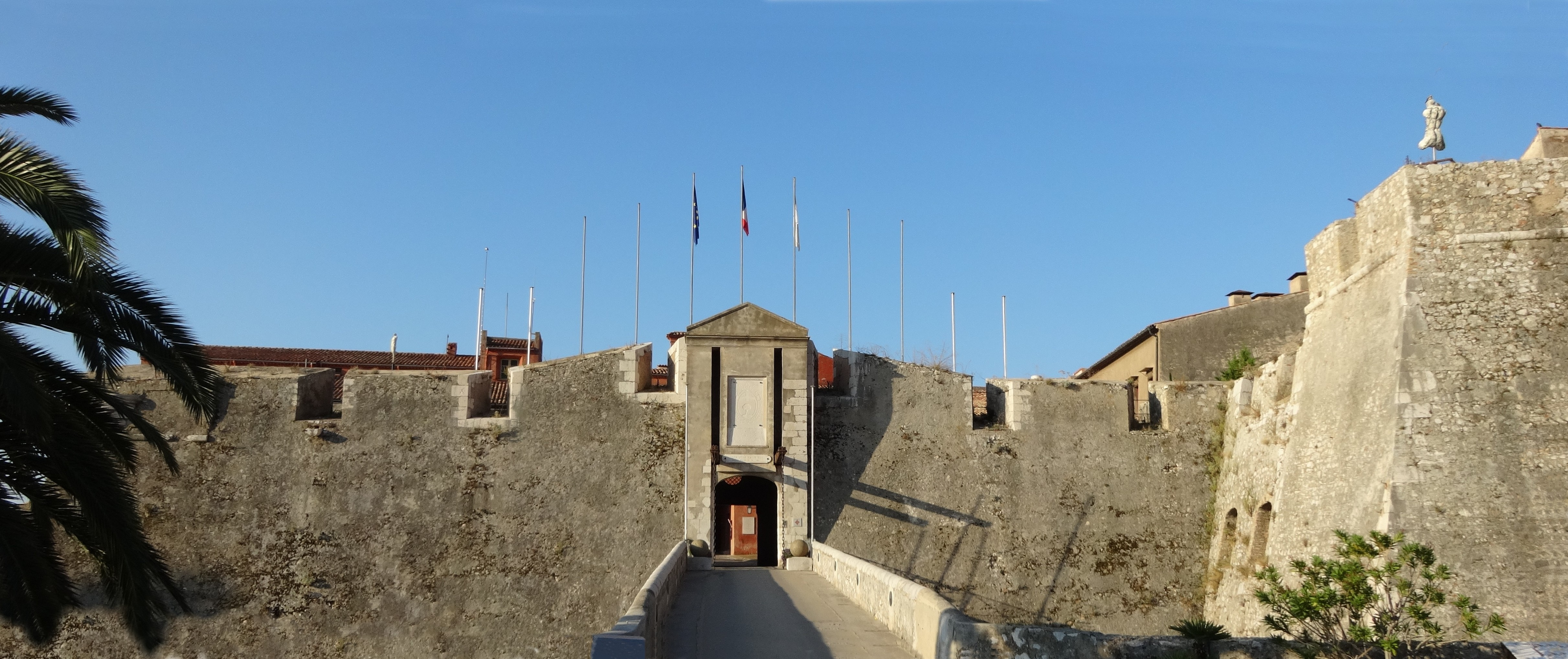 Citadelle Saint-Elme, Villefranche-sur-Mer, Alpes-Maritimes, France